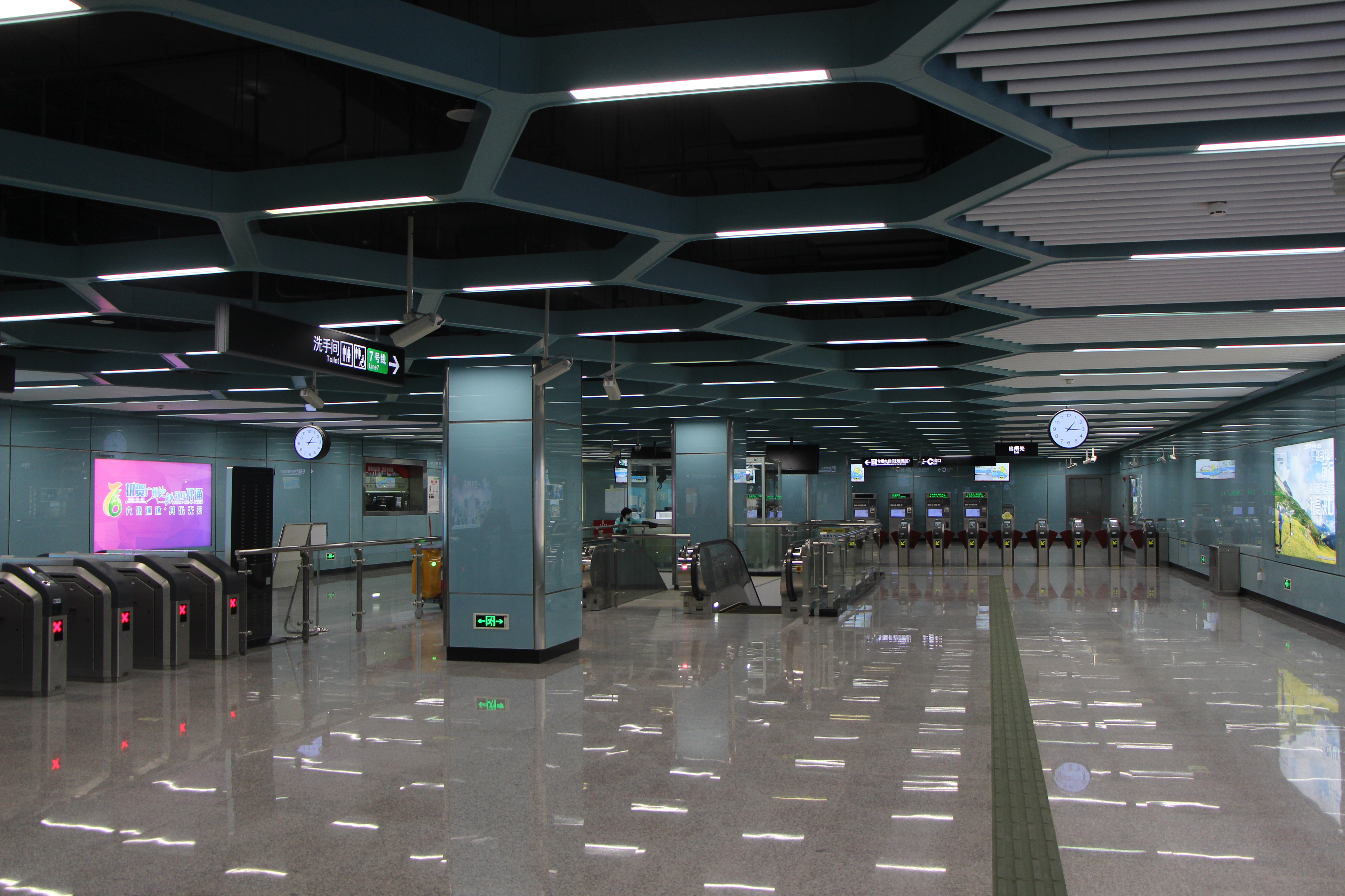 广州地铁板桥站